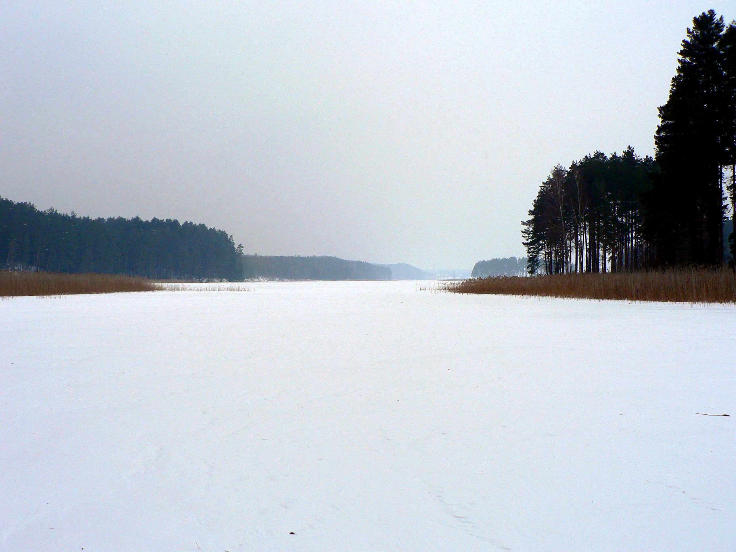 Zyzdrój Wielki lake in Mazury Author: Wojsyl, 2006